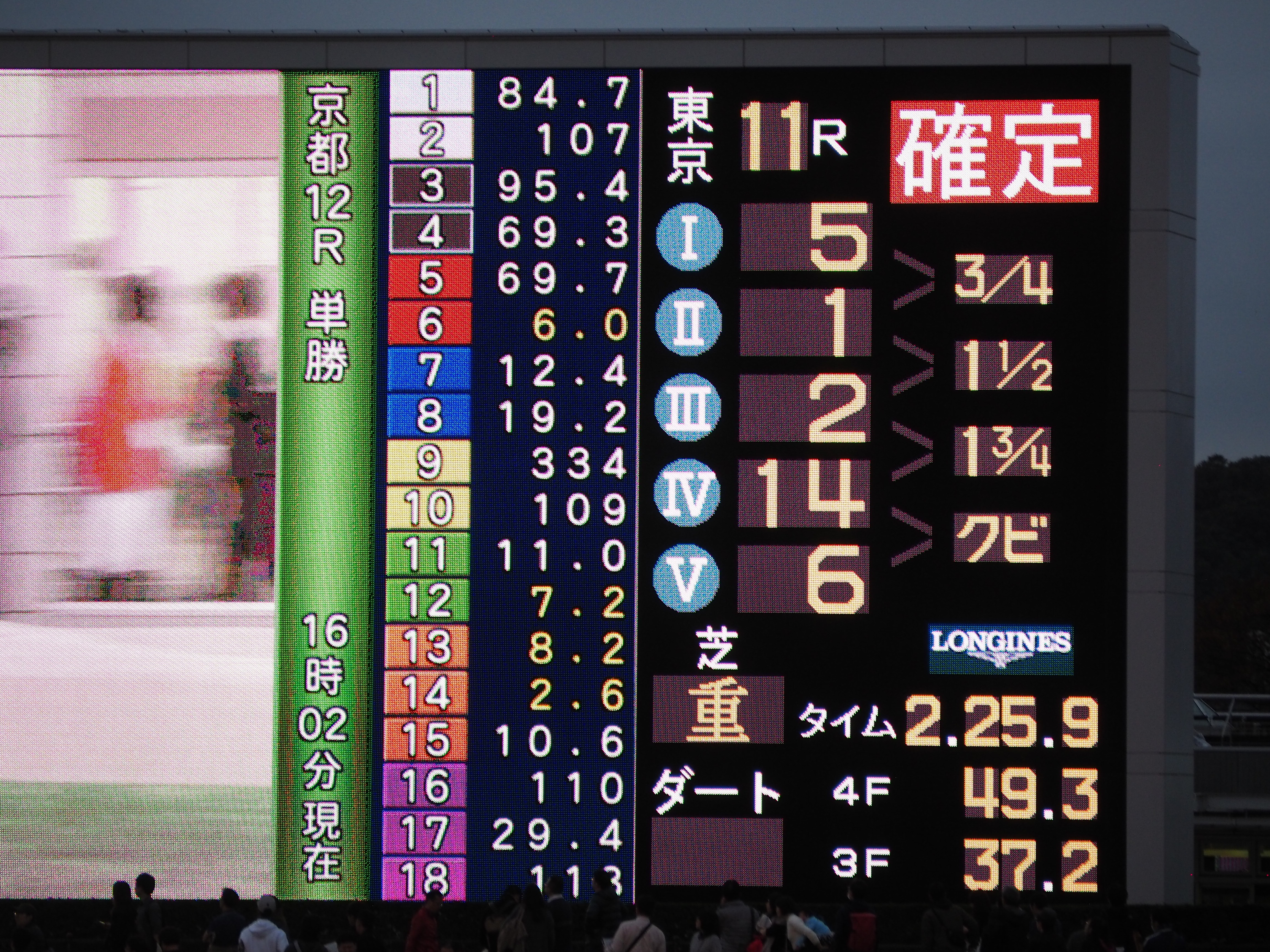 2019年ジャパンカップの着順が確定する